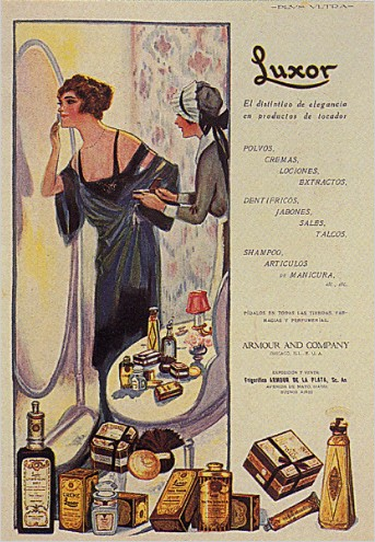 Productos de belleza Luxor